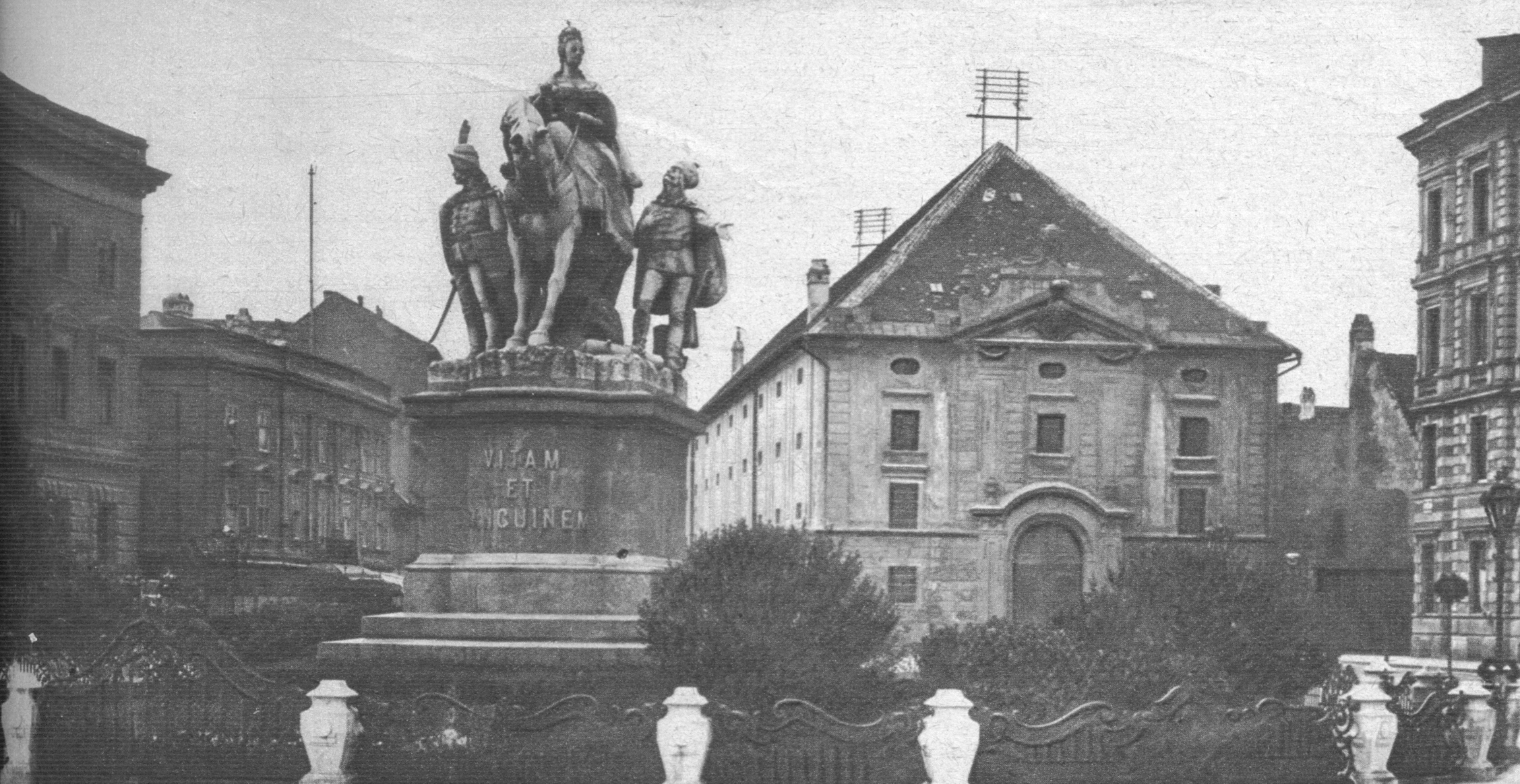 A pozsonyi Mária Terézia szobor. Fadrusz János alkotása. A cseh légionáriusok lerombolták.